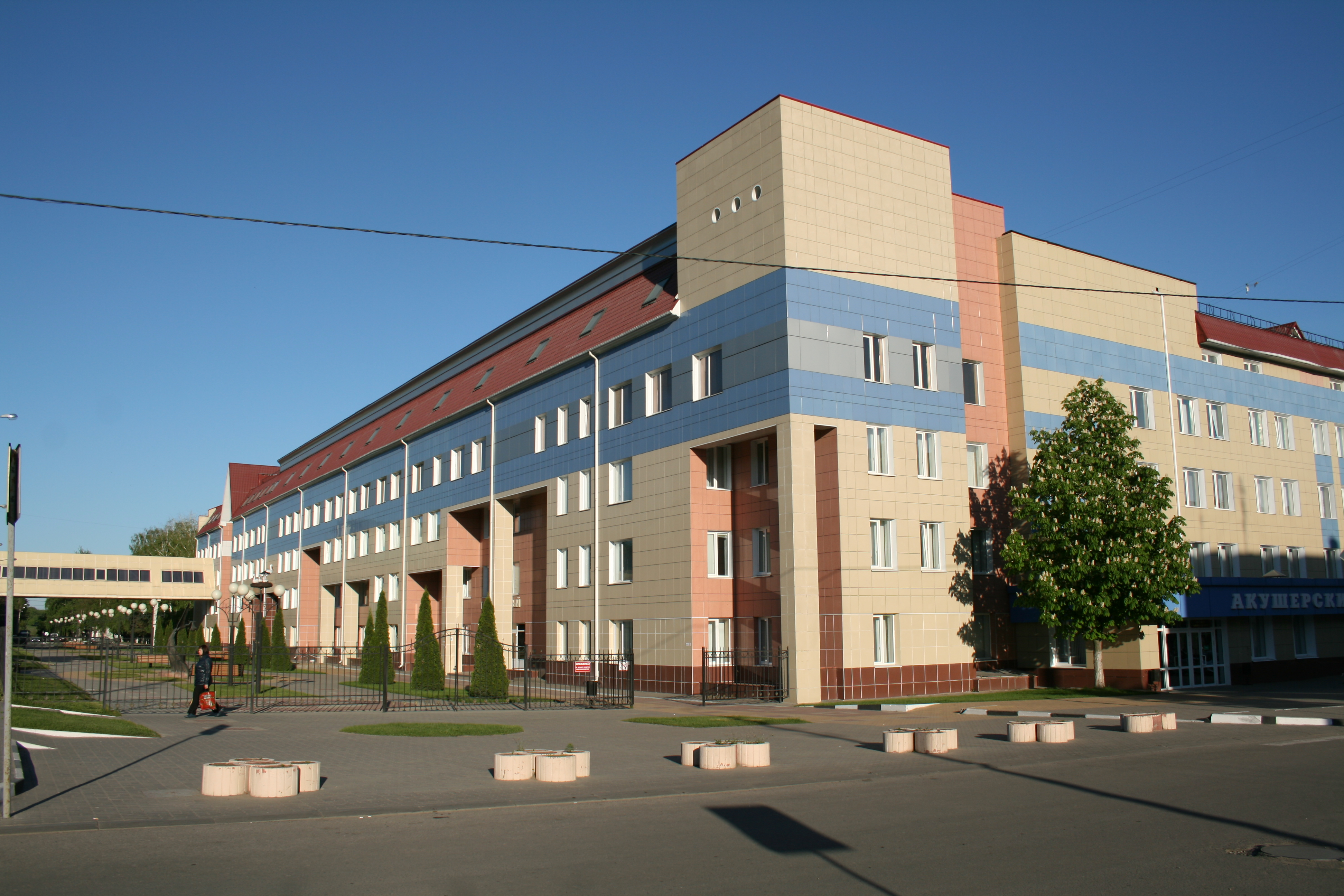 Белгородская обл. больница Перинатальный центр